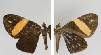 Hagnagora lex